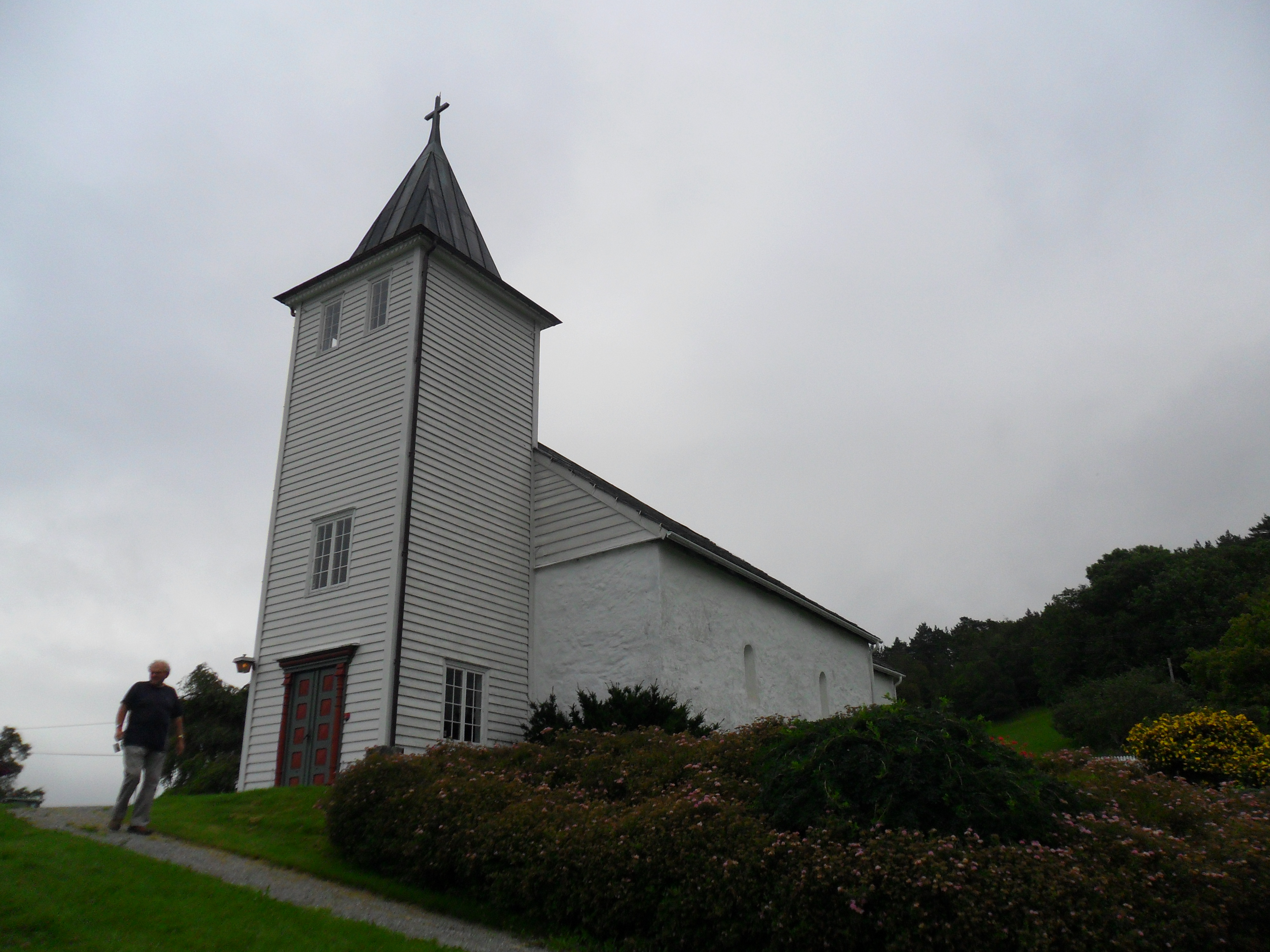 Ænes kirke i Fusa kommune, Hordaland.